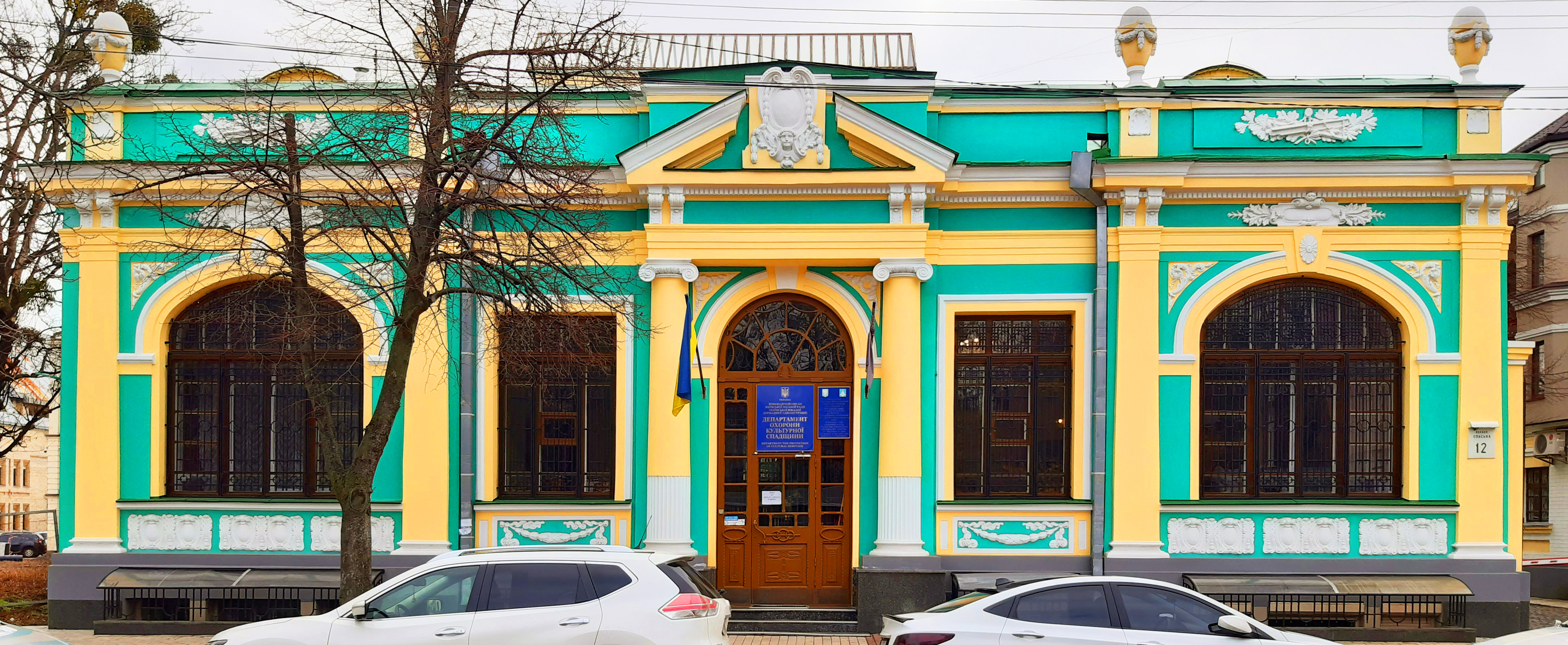 Будинок контори торгового дому «Т. М. Апштейн і сини», Київ, Спаська вул., 12